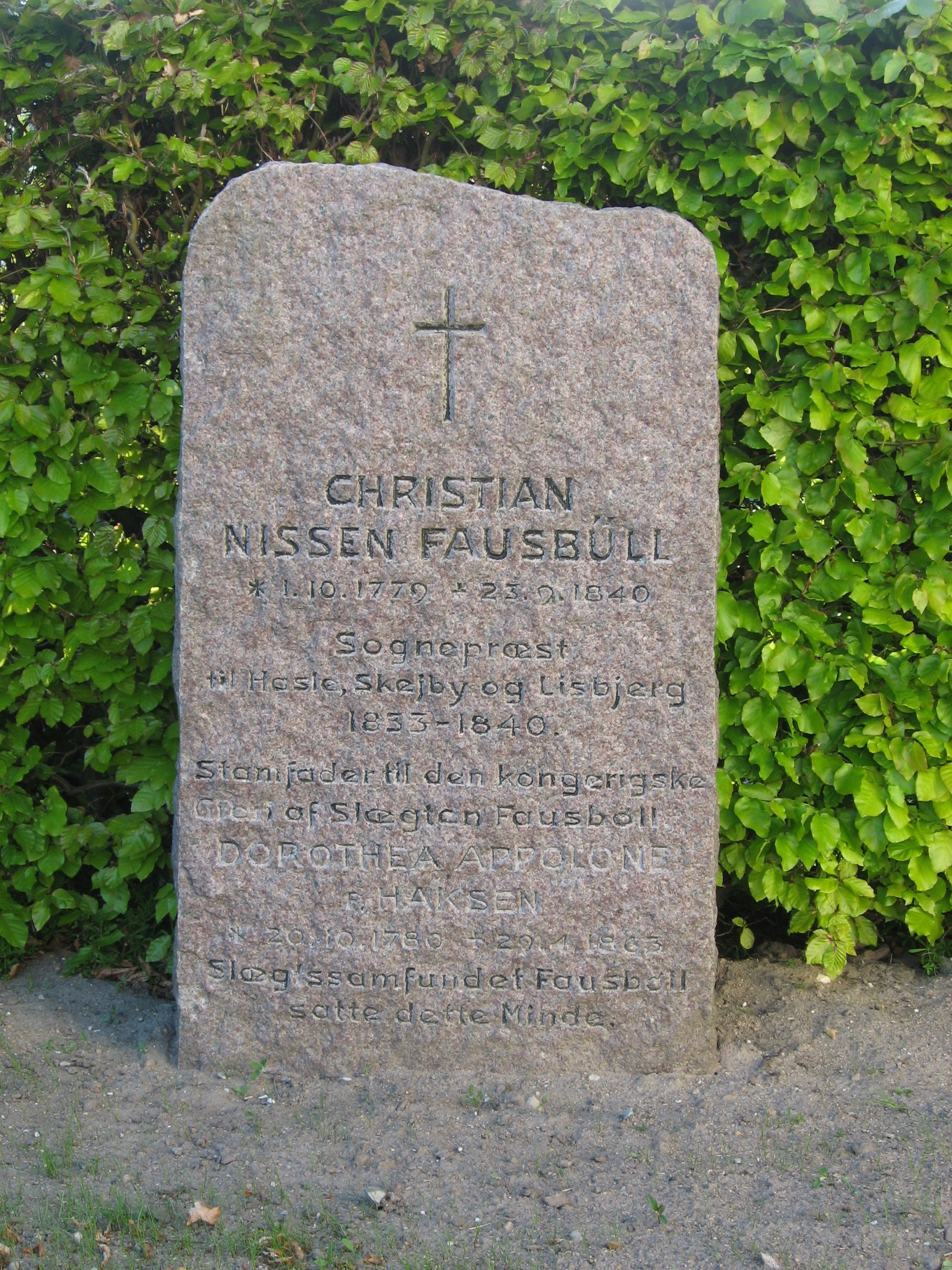 Hasle Kirke in Hasle, Århus, Denmark. Grave stone for Christian Nissen Fausbüll (1779-1840) and wife.